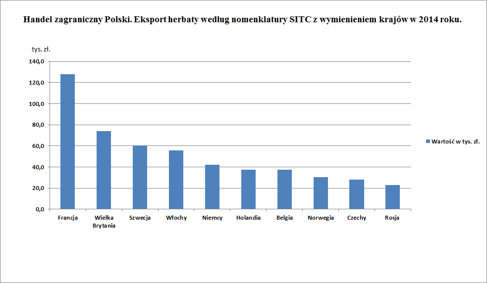 Źródło: Rocznik Statystyczny Handlu Zagranicznego 2015